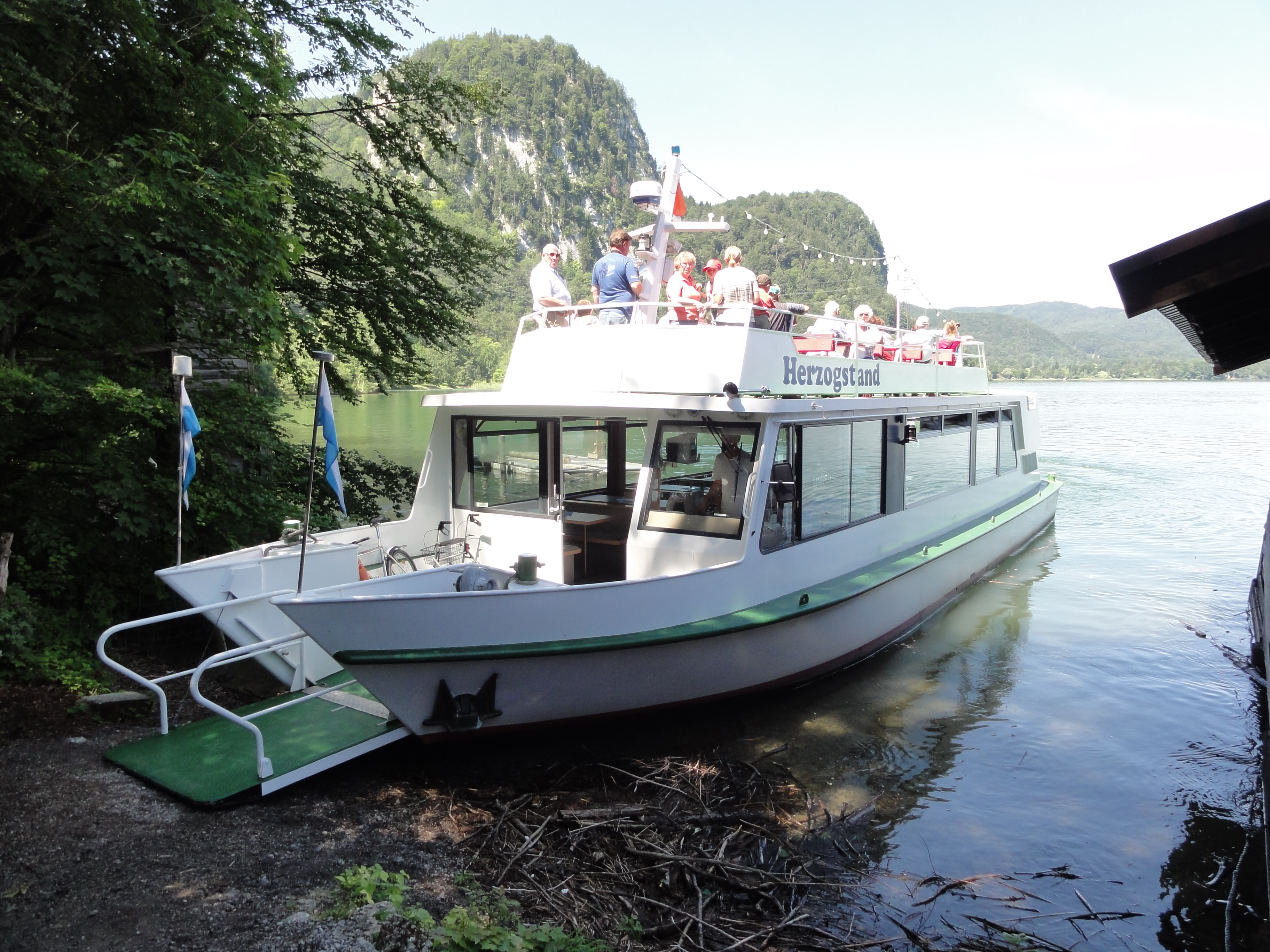 Das Fahrgastschiff MS Herzogstand auf dem Kochelsee an der Anlegestelle "Altjoch" am Südufer des Sees.